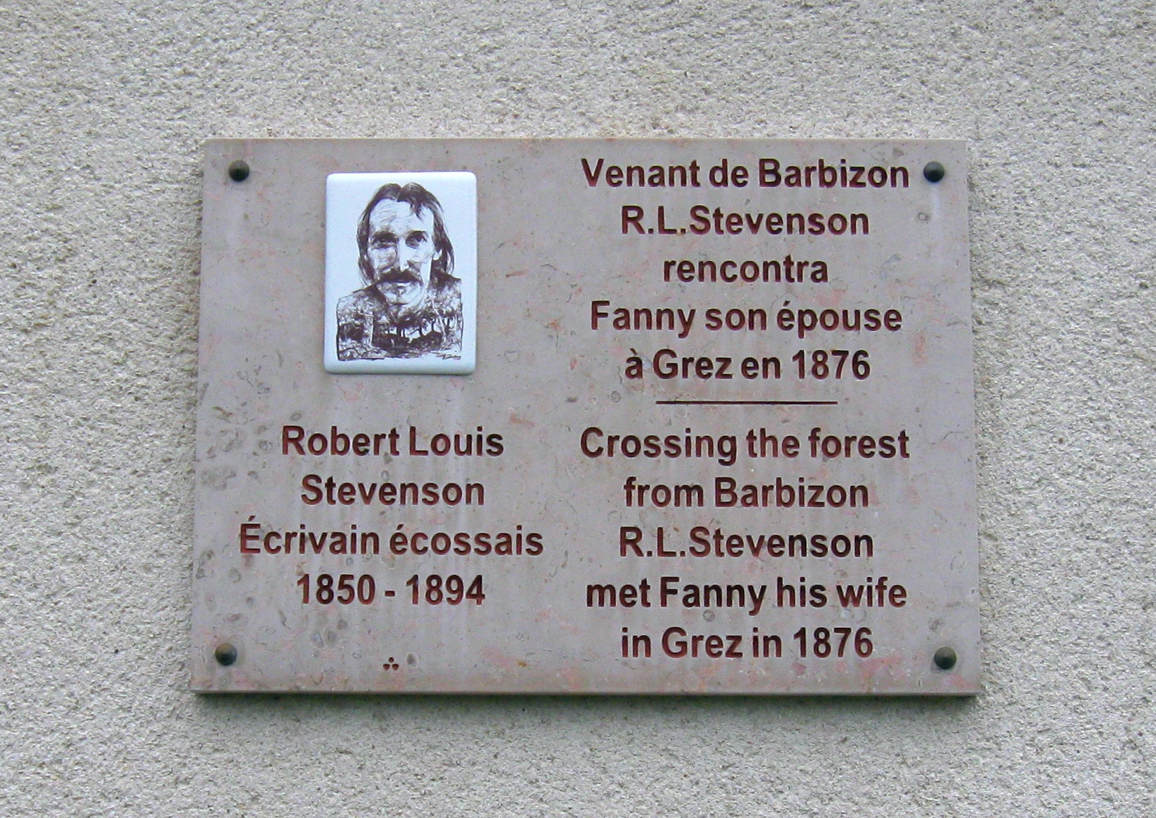 R. L. Stevenson, plaque commémorative. (Grez-sur-Loing, Seine-et-Marne, Île-de-France).